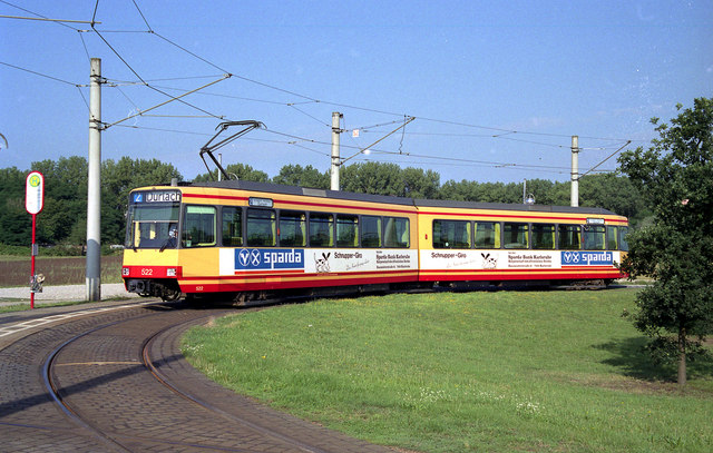 Tram at Rheinstrandsiedlung